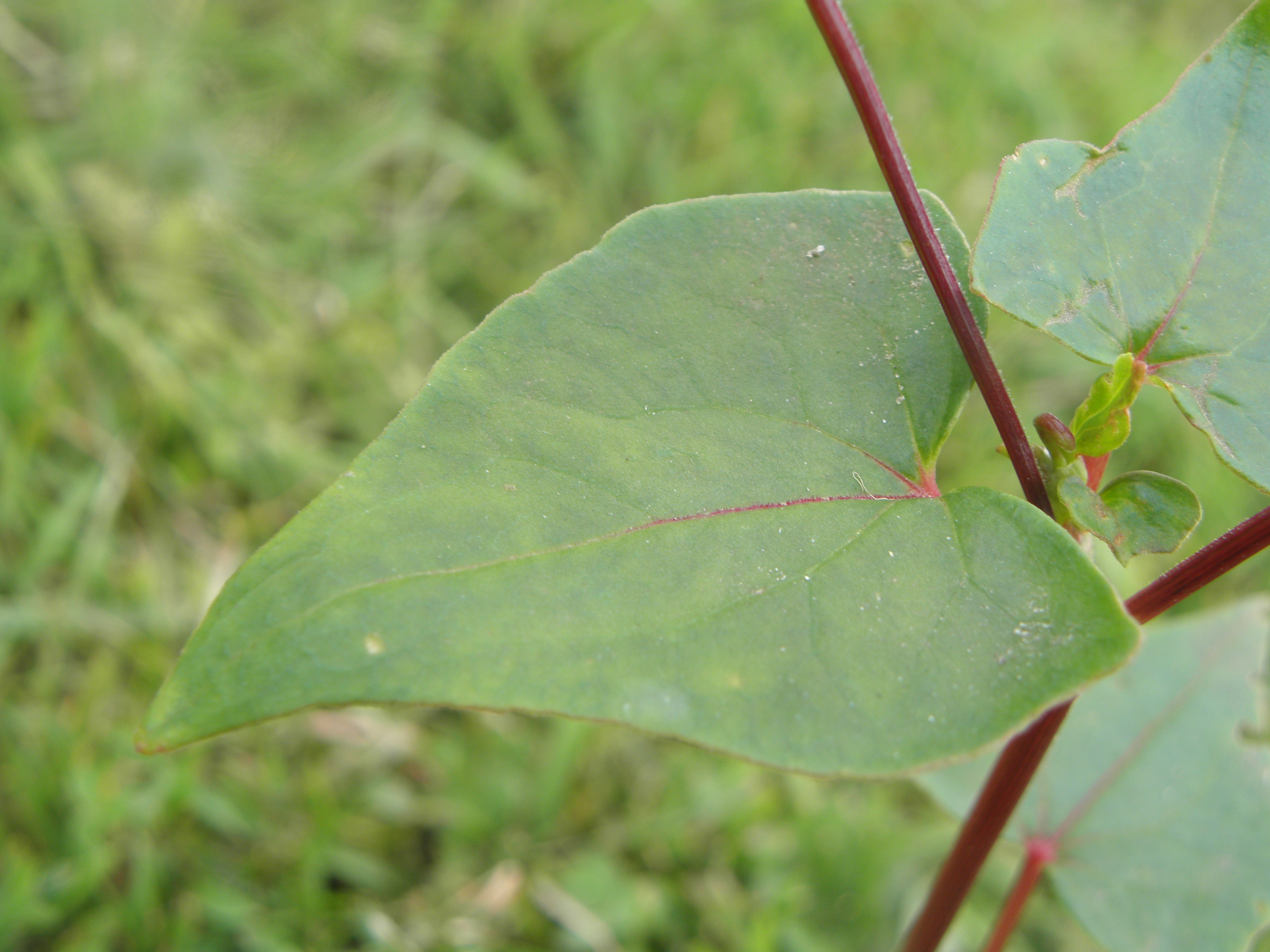 Fagopyrum esculentum